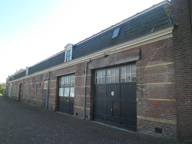 Loodsen aan de Bierkade en Zilverstraat